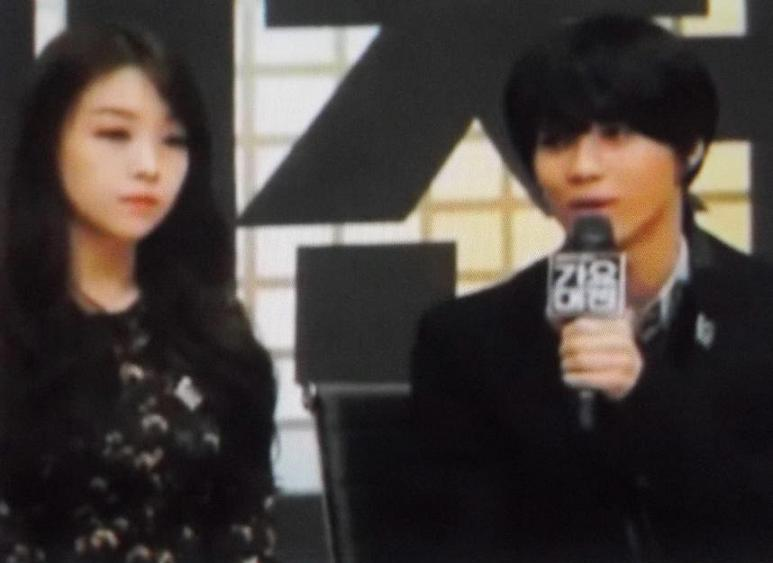 Taemin Dan Minah The Miracle Tekan Confrence Desember 2013